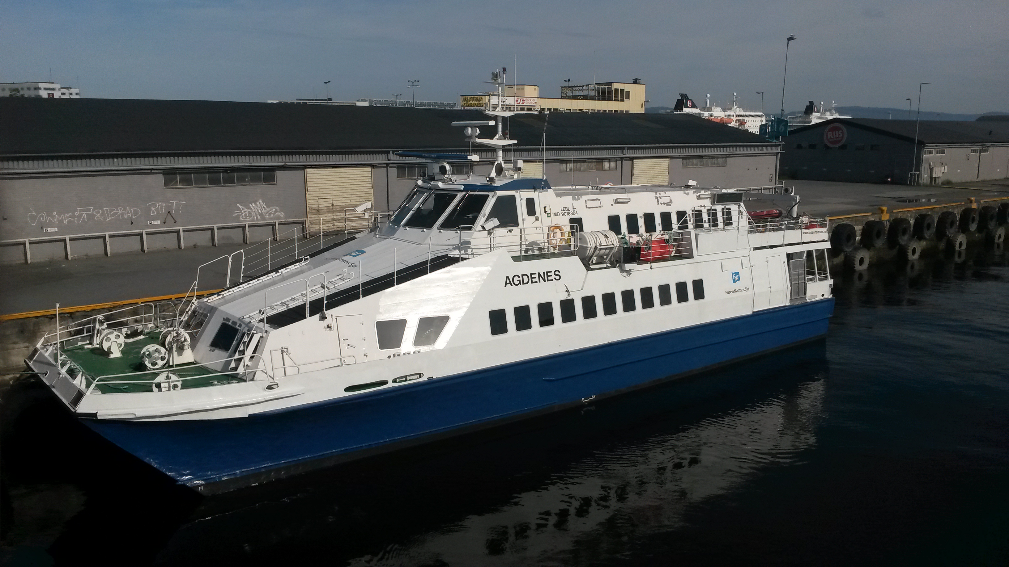 Agdenes i nye FosenNamsos farger etter verkstedsopphold på Hitra.